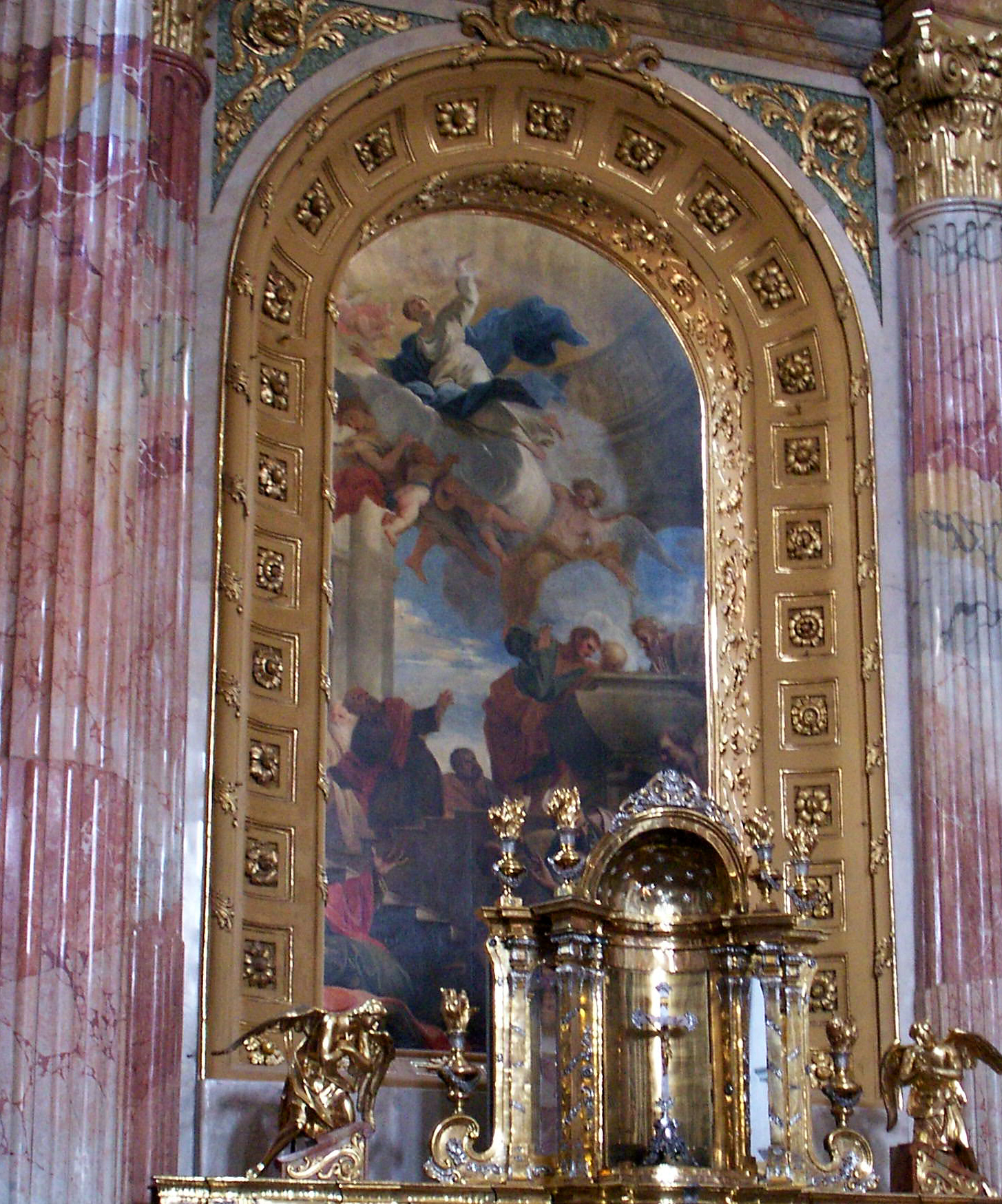 Ascensão da Virgem Maria